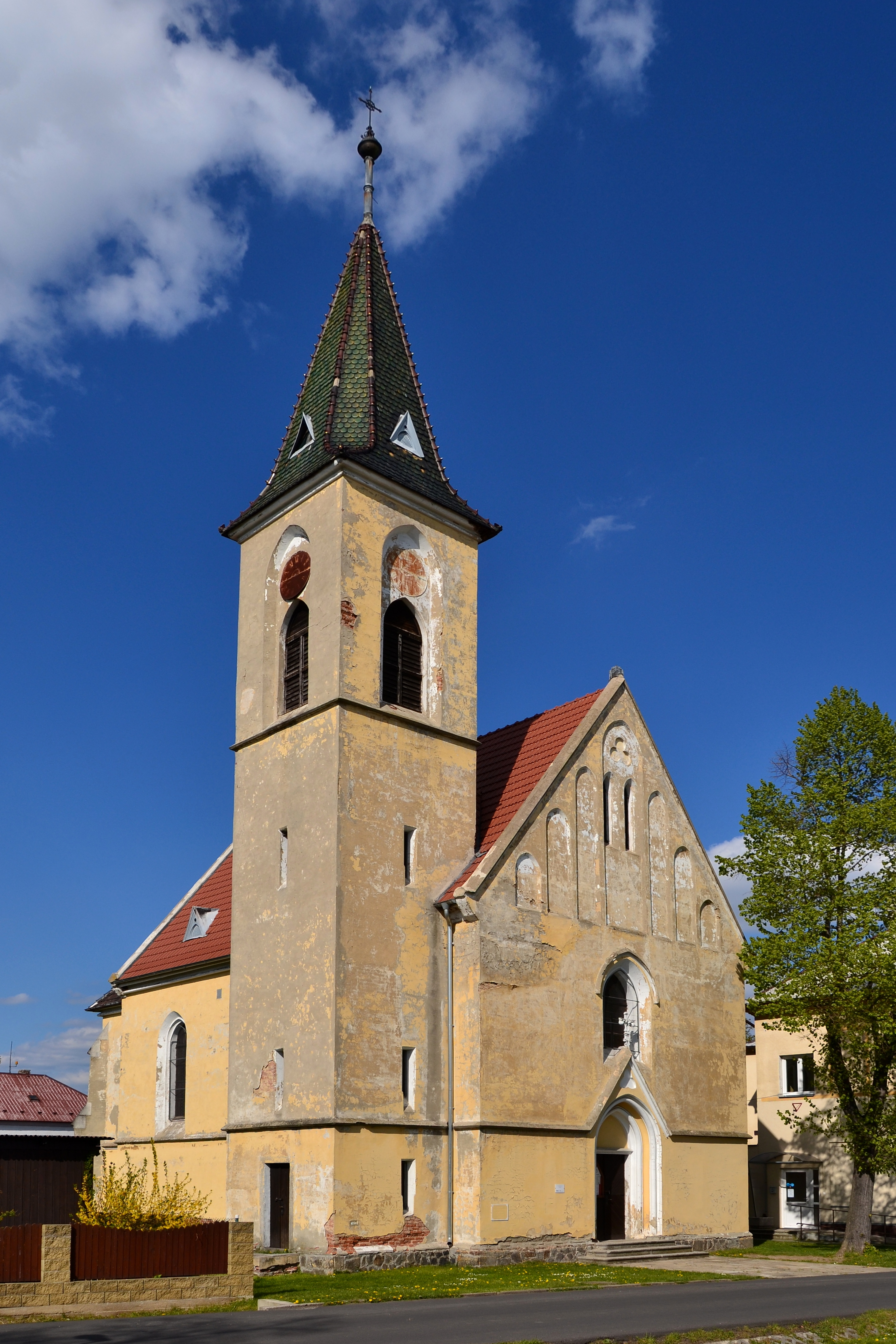 Kostel z jihozápadu